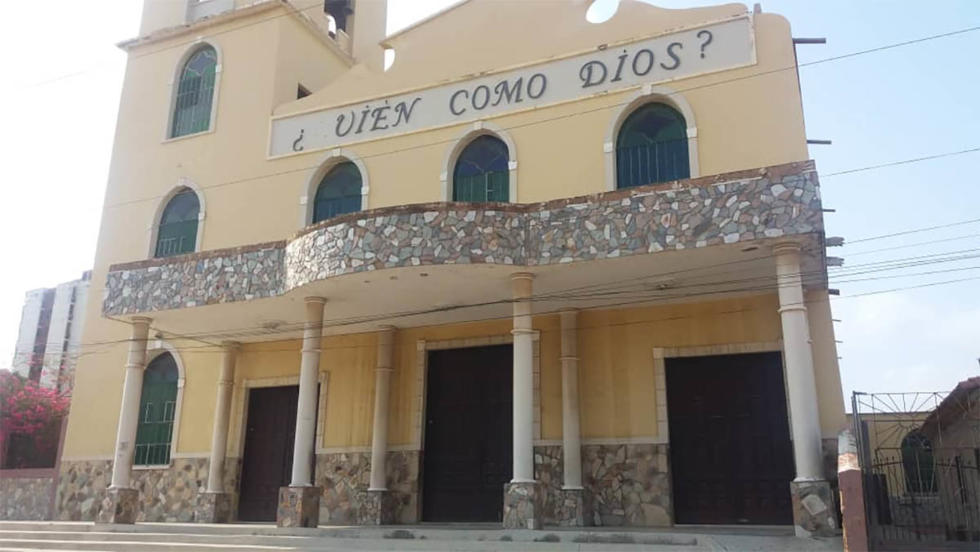 Iglesia Católica